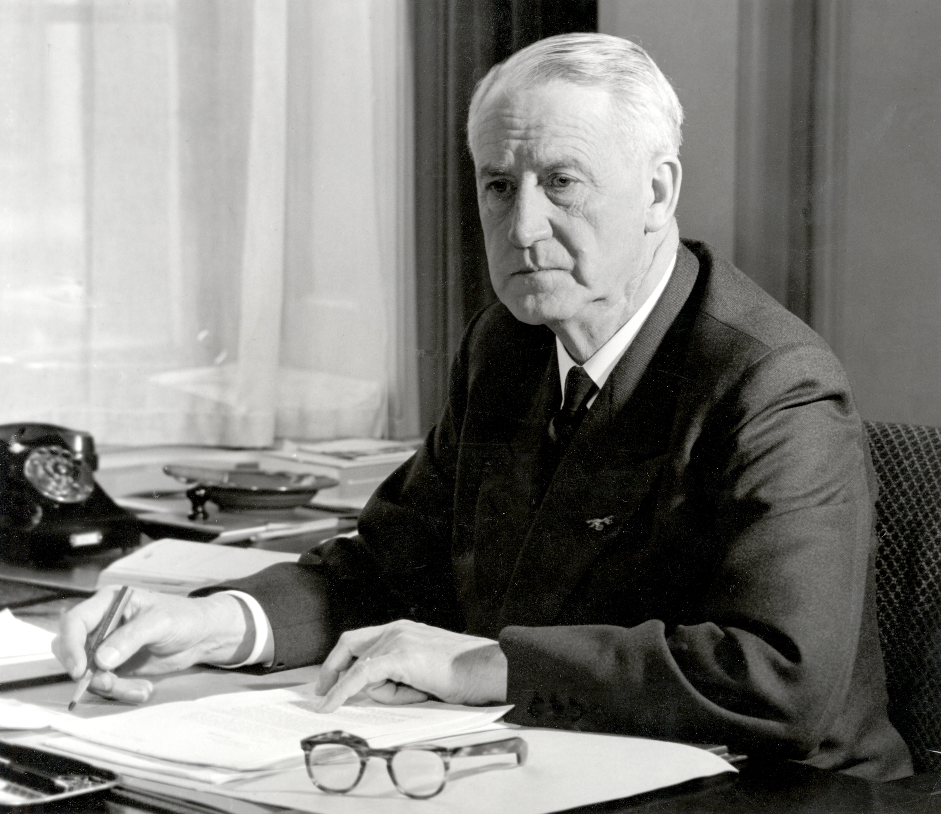 Den Haag (Nederland) Adrianus Cornelis de Bruijn (1887-1968) Minister van Publiekrechtelijke Bedrijfsorganisatie. Hij zit achter zijn bureau met potlood in de hand en papieren voor hem. Zijn bril heeft hij naast zich neergelegd. 20 september 1952.